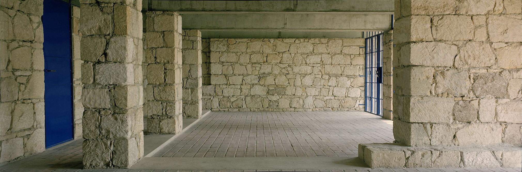 Bildhauerunterkunft St. Margarethen, Architekt Johann Georg Gsteu